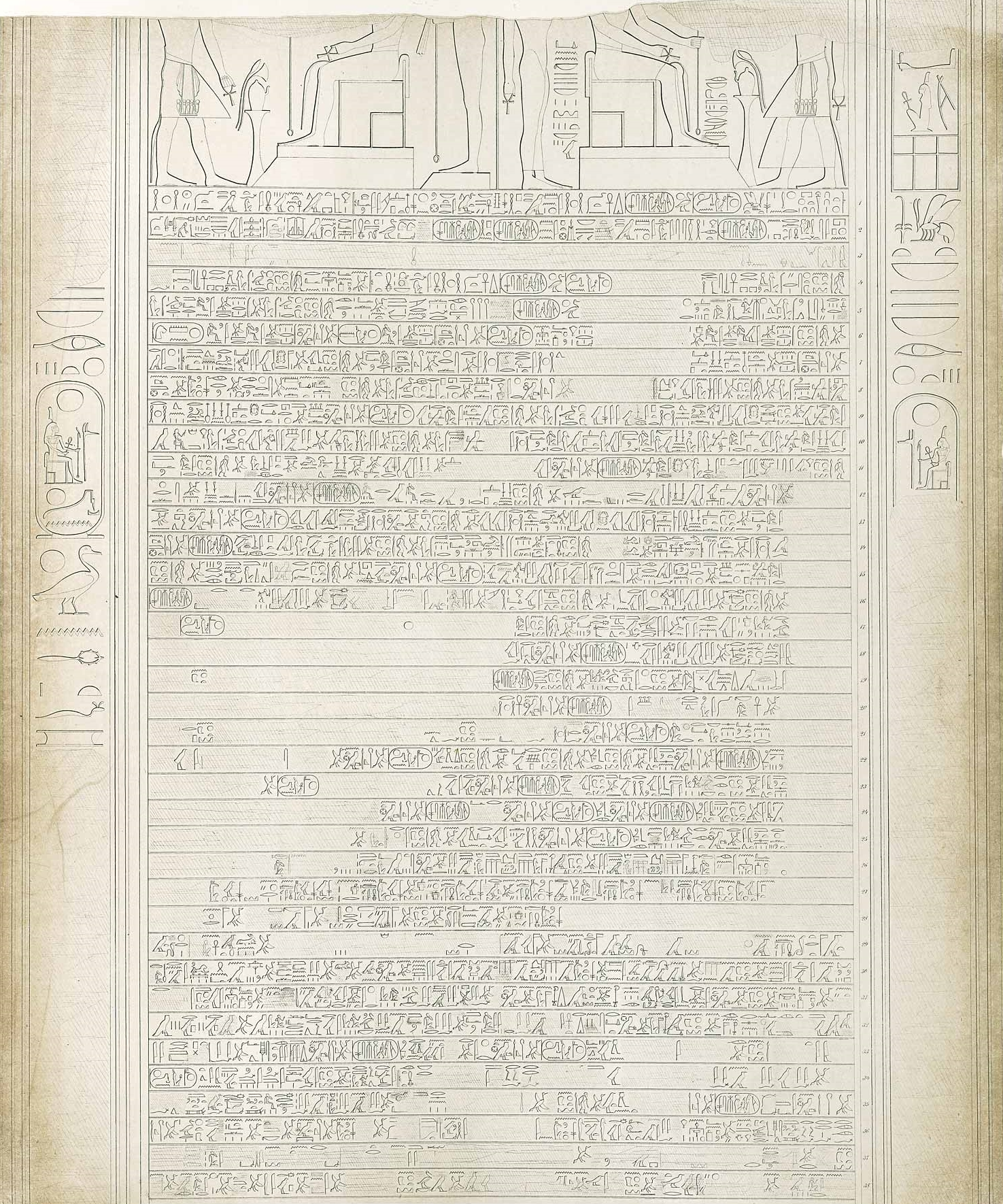 Abzeichnung des Ägyptisch-Hethitischen Friedensvertrags an der westlichen Außenwand des Cachette-Hofes im Tempel von Karnak, Luxor, Ägypten